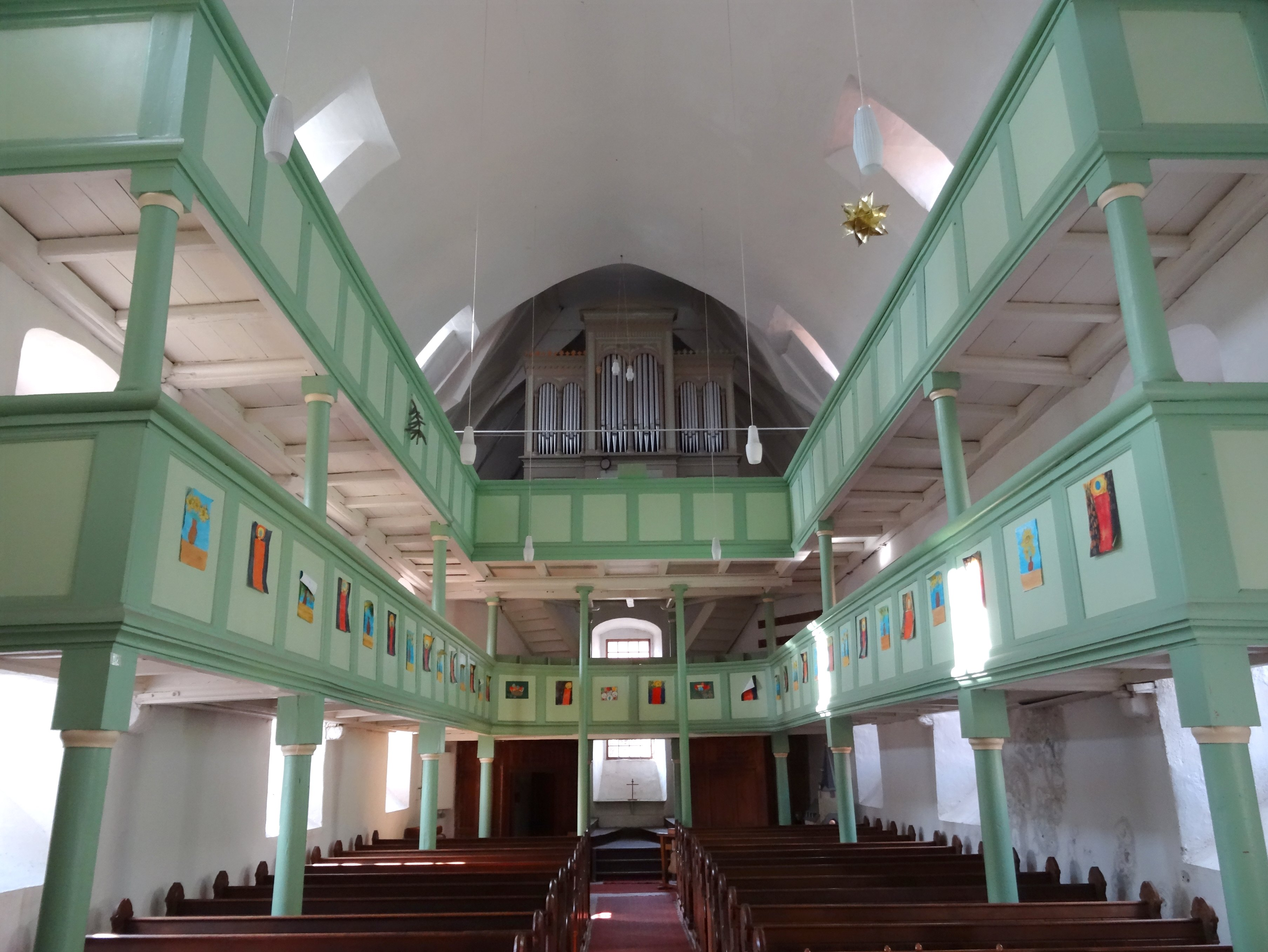 Innenraum St. Michael Großleinungen